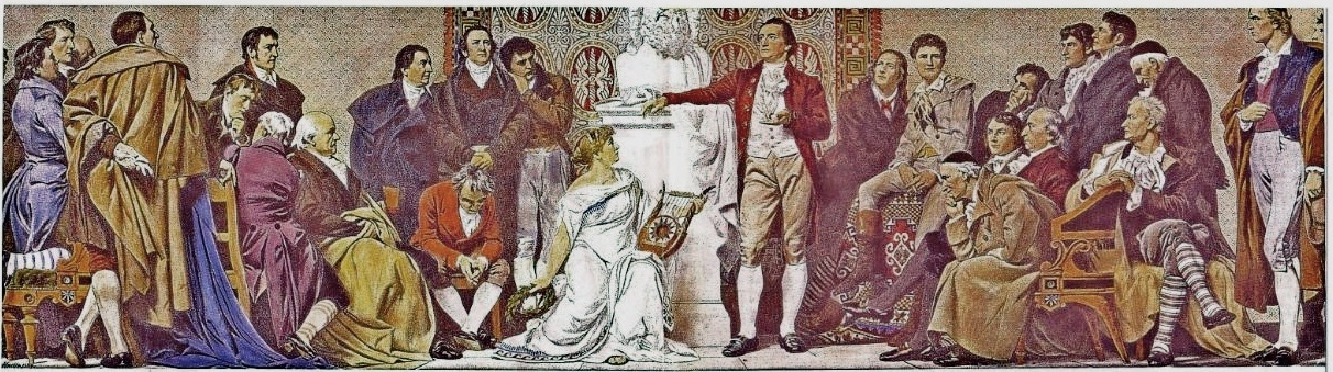 Fresque peinte par Otto Knille en 1884, représentant les Romantiques des deux premières générations, le Sturm und Drang et le Cercle d'Iena. Goethe est au centre ; Schiller à l'extrémité droite du tableau ; Tieck se tient sur la gauche de Goethe, à côté du buste et juste au dessus de la muse Terpsichore.